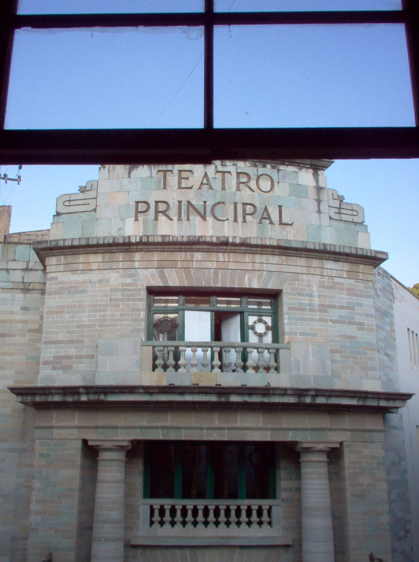 Desde la ventana de enfrente. Guanajuato (city), Guanajuato.